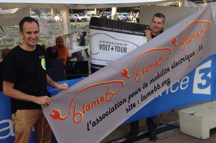 Els dies 18 i 19 de setembre de 2015 s'organitzà a Perpinyà (Catalunya del Nord) la primera Mostra Verda de vehicles elèctrics entre l'associació nord-catalana de vehicle elèctric LAME66 i l'associació catalana promotora del vehicle elèctric Volt-Tour